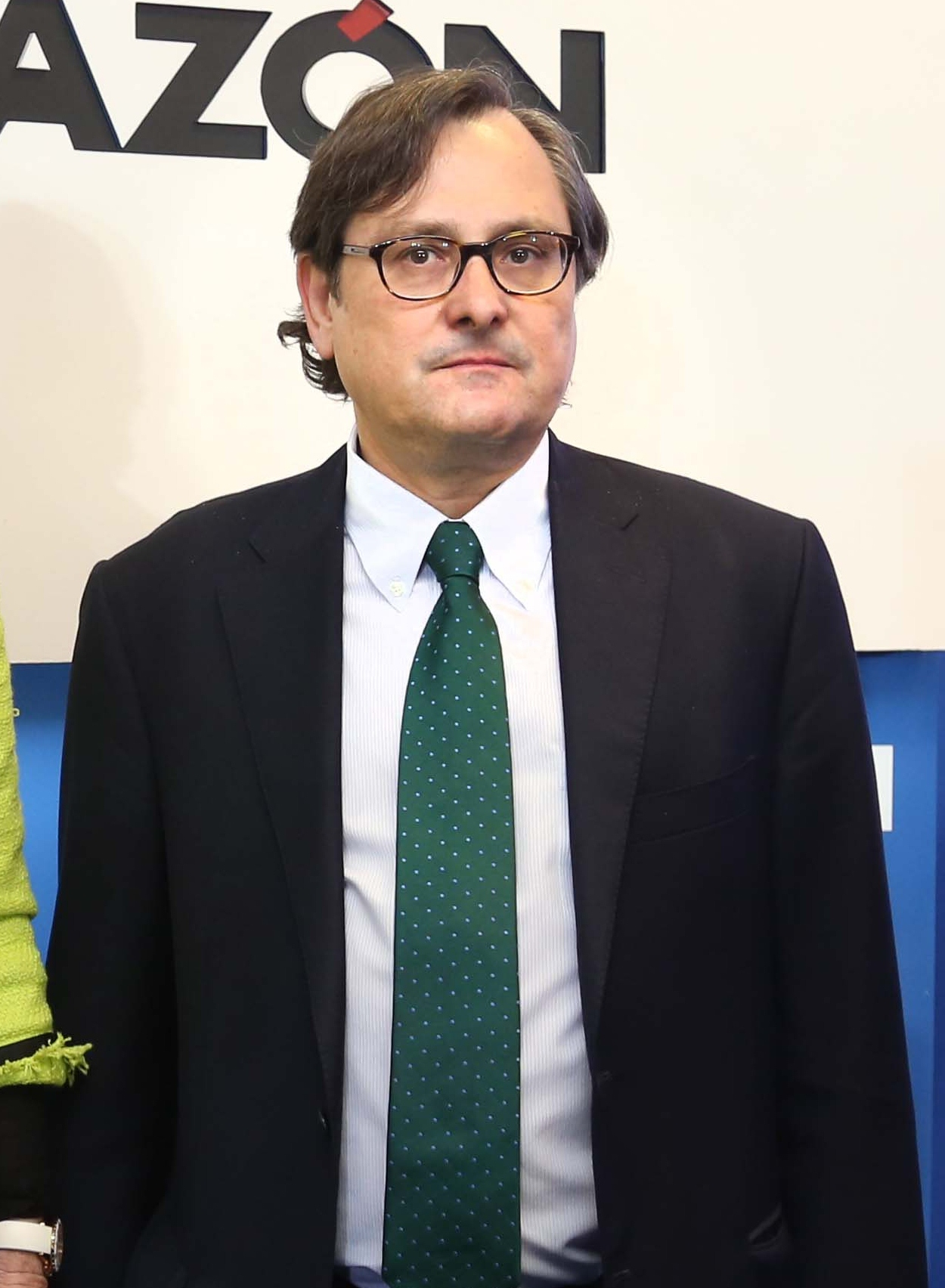 Francisco Marhuenda en mayo de 2013. Cropped version of File:Esperanza Aguirre y Francisco Marhuenda.jpg.